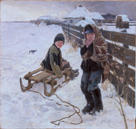 Головков Герасим Семенович Морозный день. На санках. (1898 холст, масло, 104х138) НХМУ, Киев